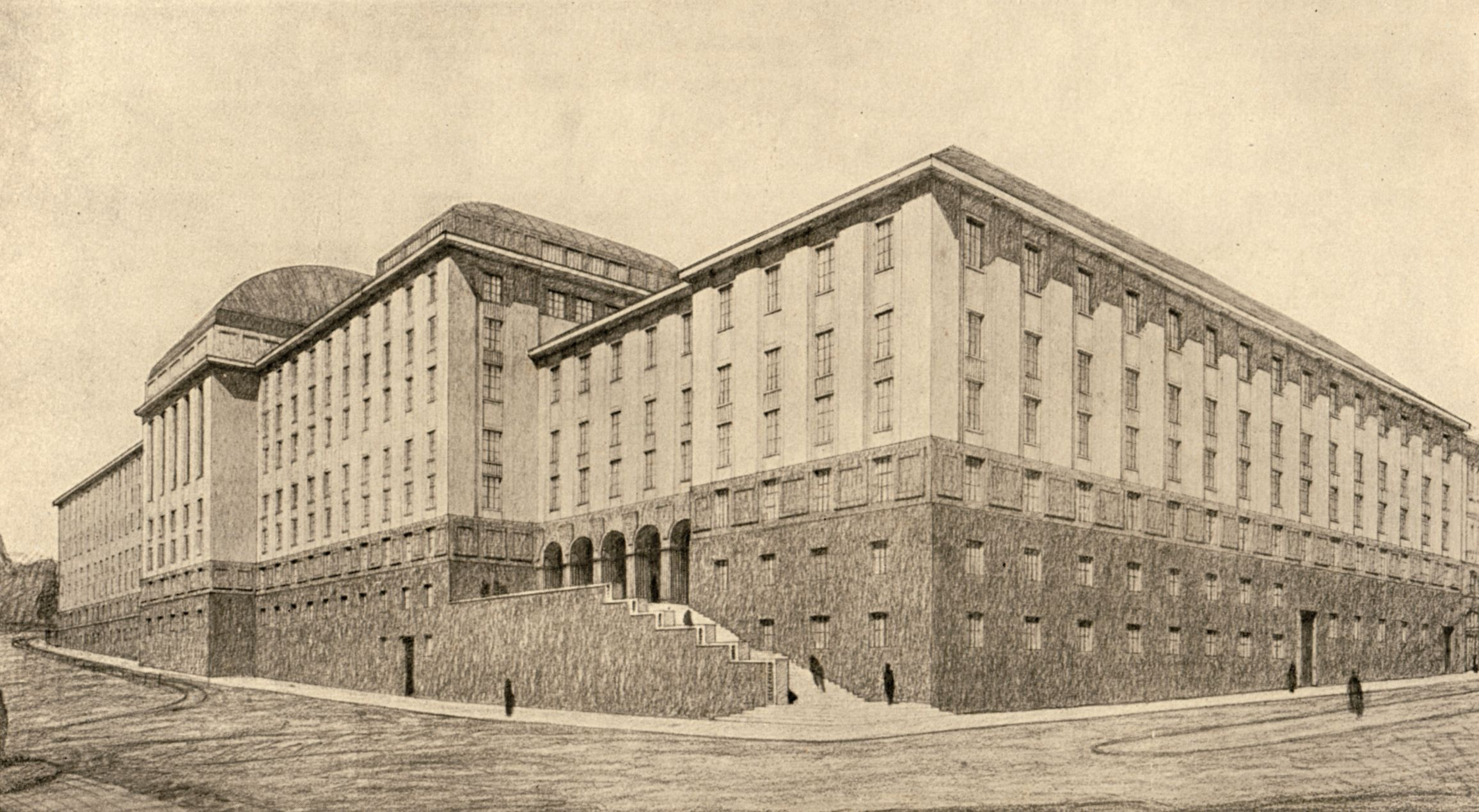 Genf - Wettbewerb naturhistorisches Museum 1912, Projekt Maurice Turrettini/Guillaume Revilliod, 2. Preis